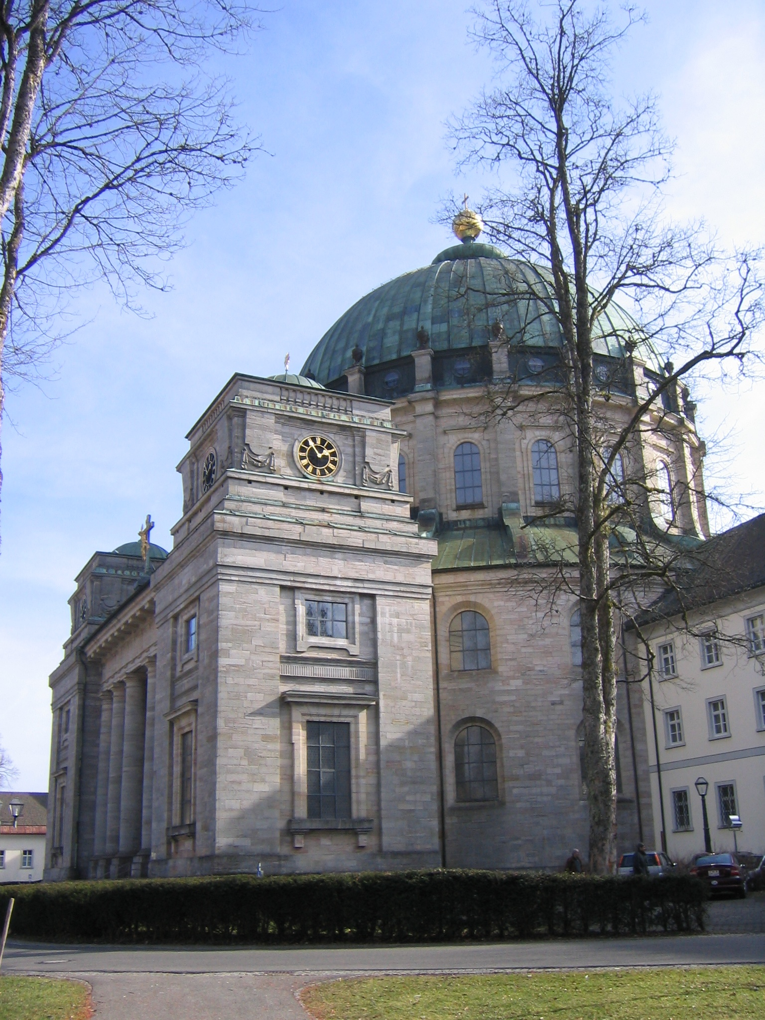 Dom St. Blasien